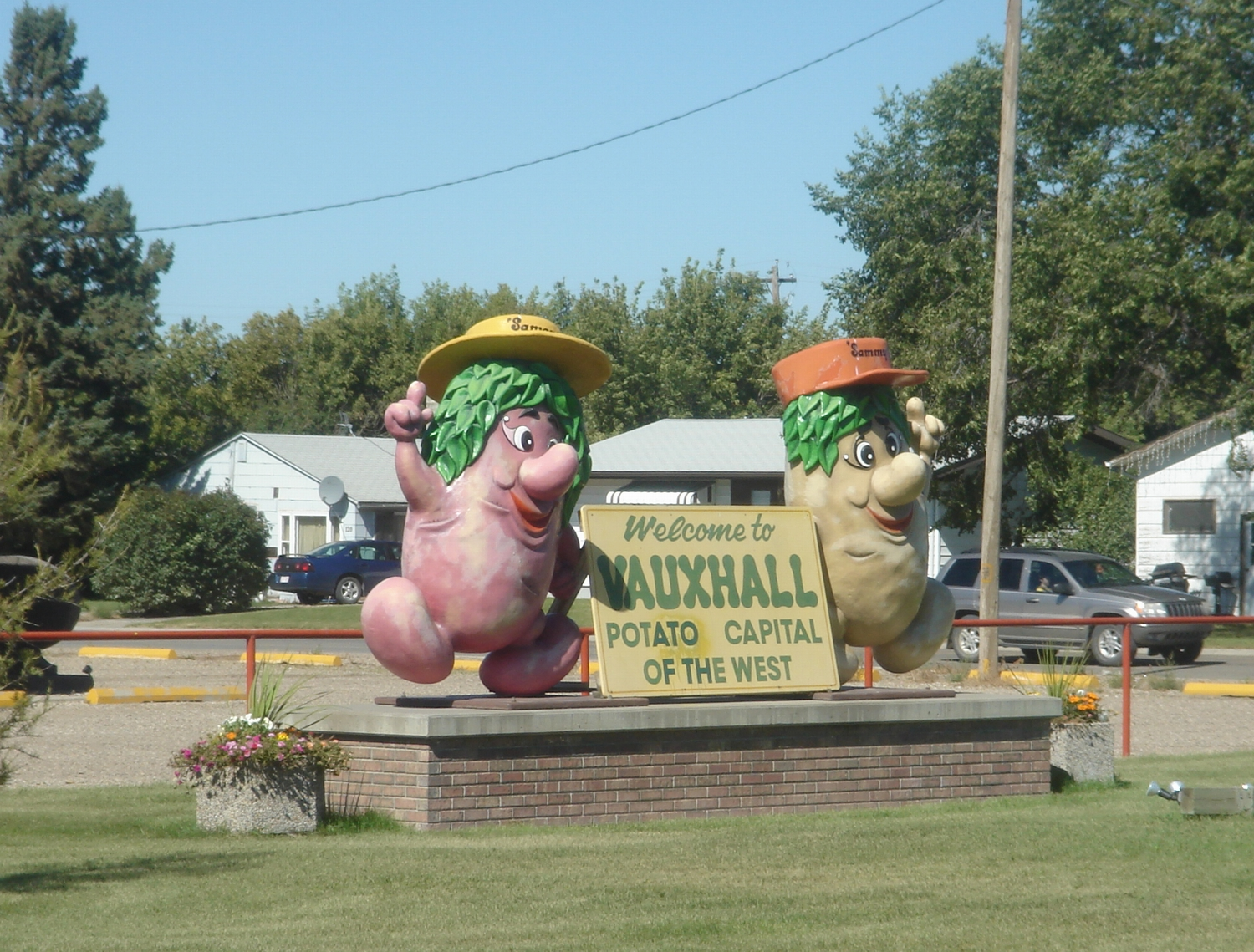 Welcome sign in Vauxhall, Alberta